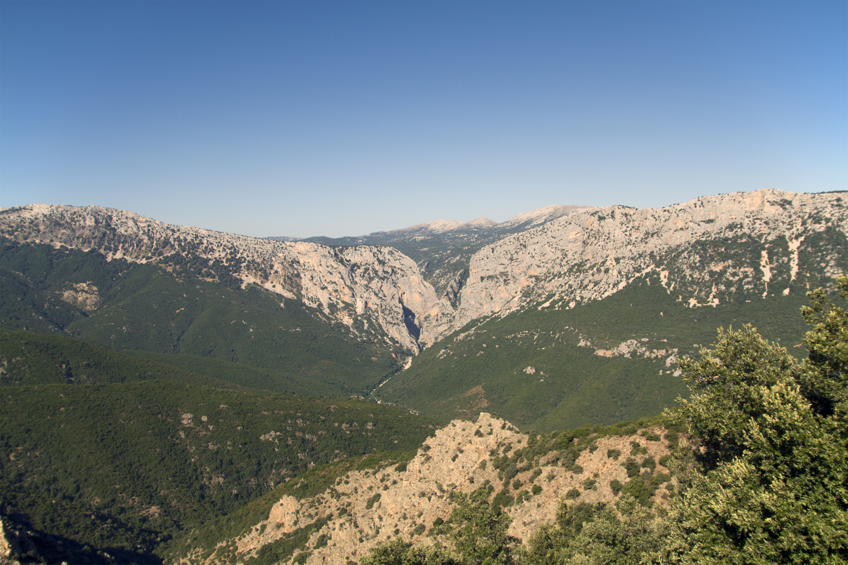 Gola di Su Gorroppu